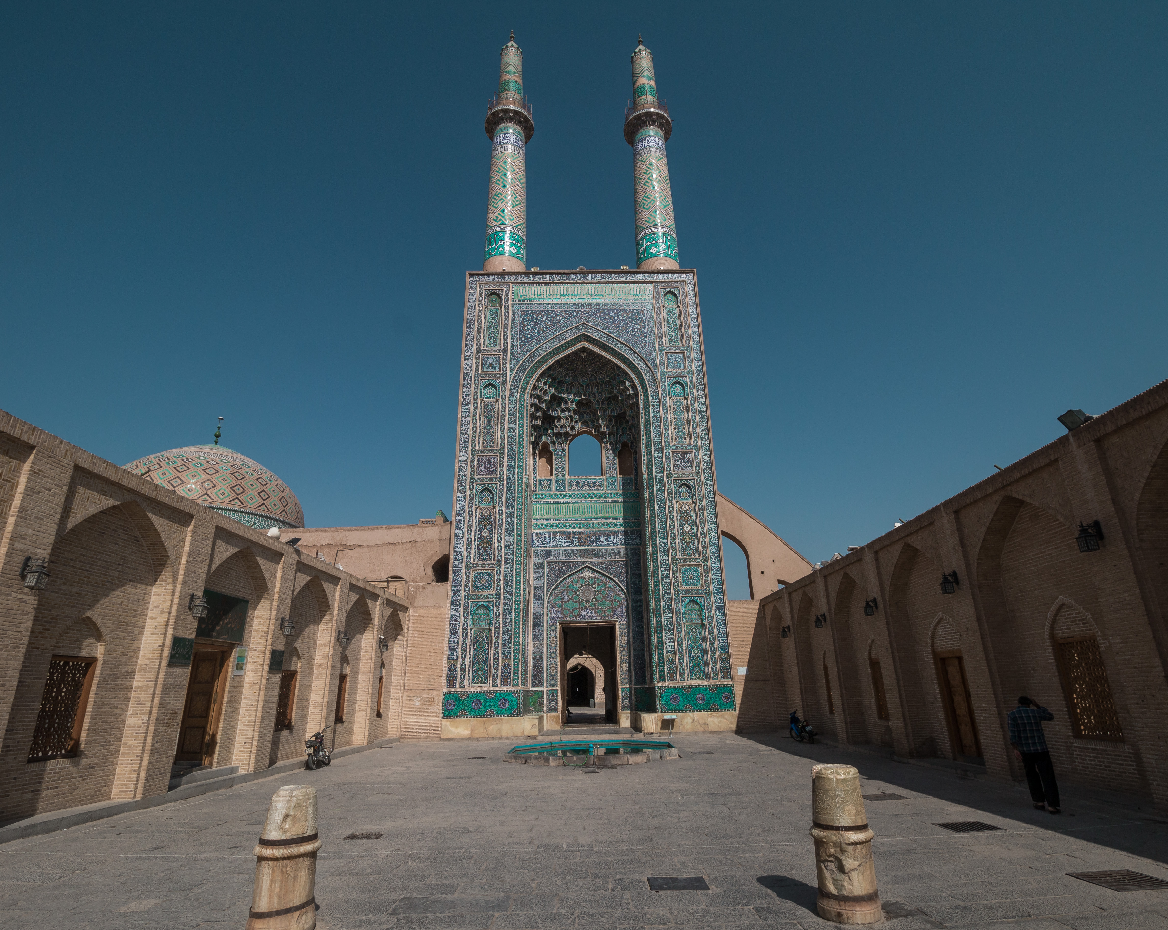 مسجد جامع یزد